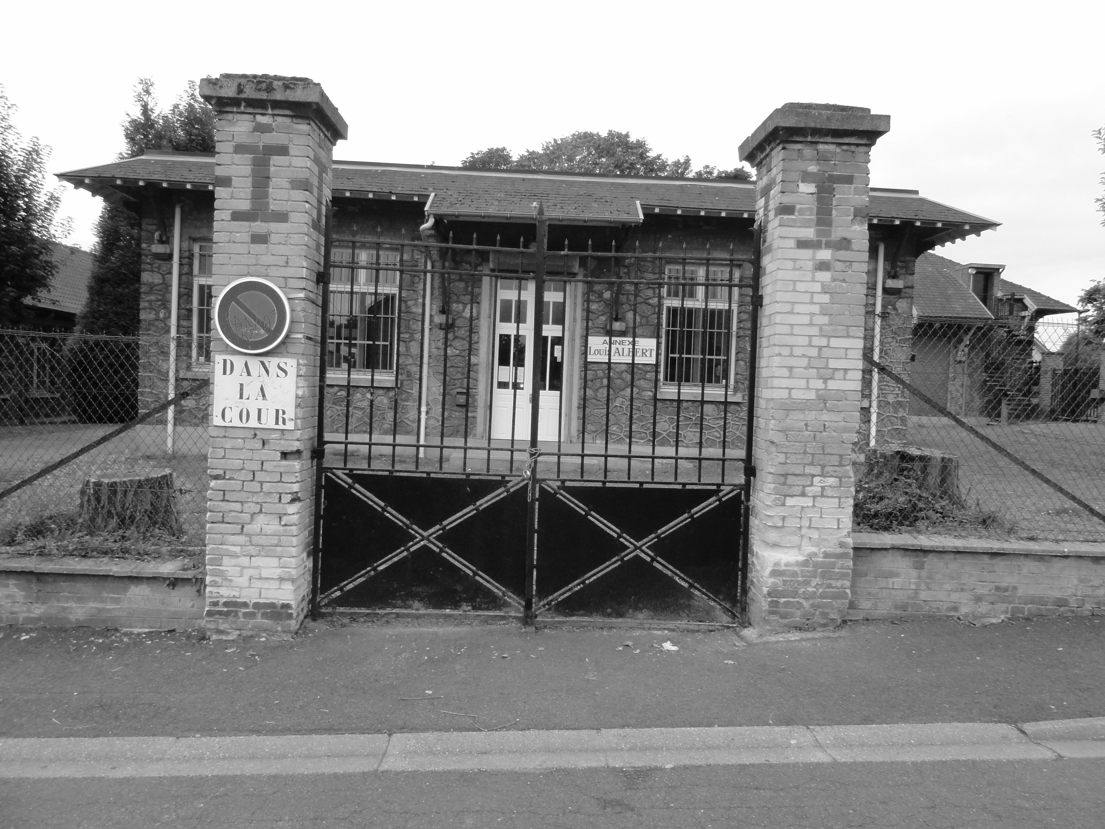 Écoles des cités de la Fosse n° 11 - 19 de la Compagnie des mines de Lens, Lens, Pas-de-Calais, Nord-Pas-de-Calais, France. .